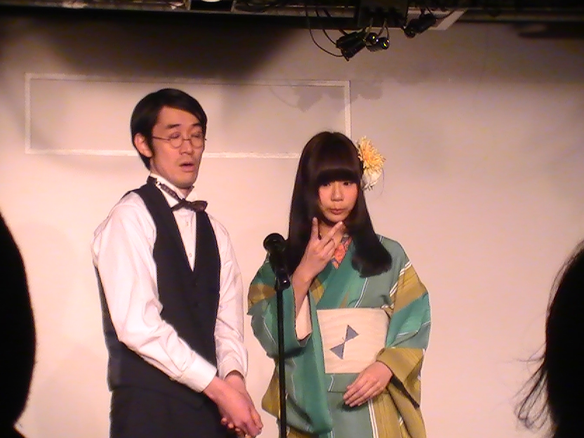 たぬきごはん (2016年1月)